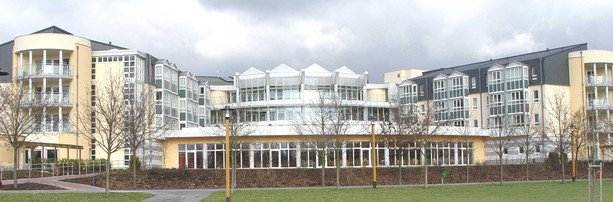 Sujet:Mamer Altersheim Source: Lizenz:GFDL